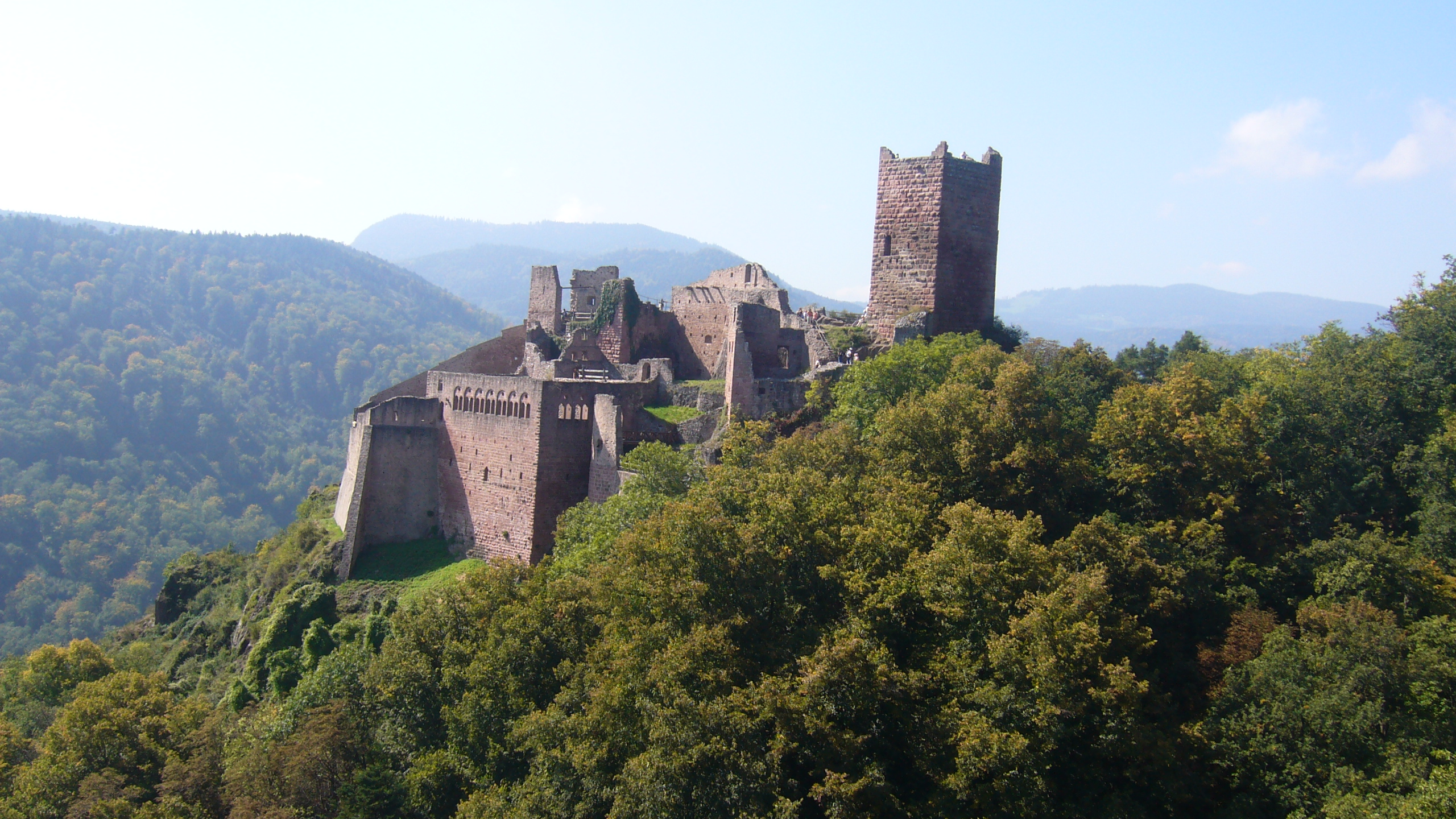 Château du Saint-Ulrich vue depuis le Girsberg